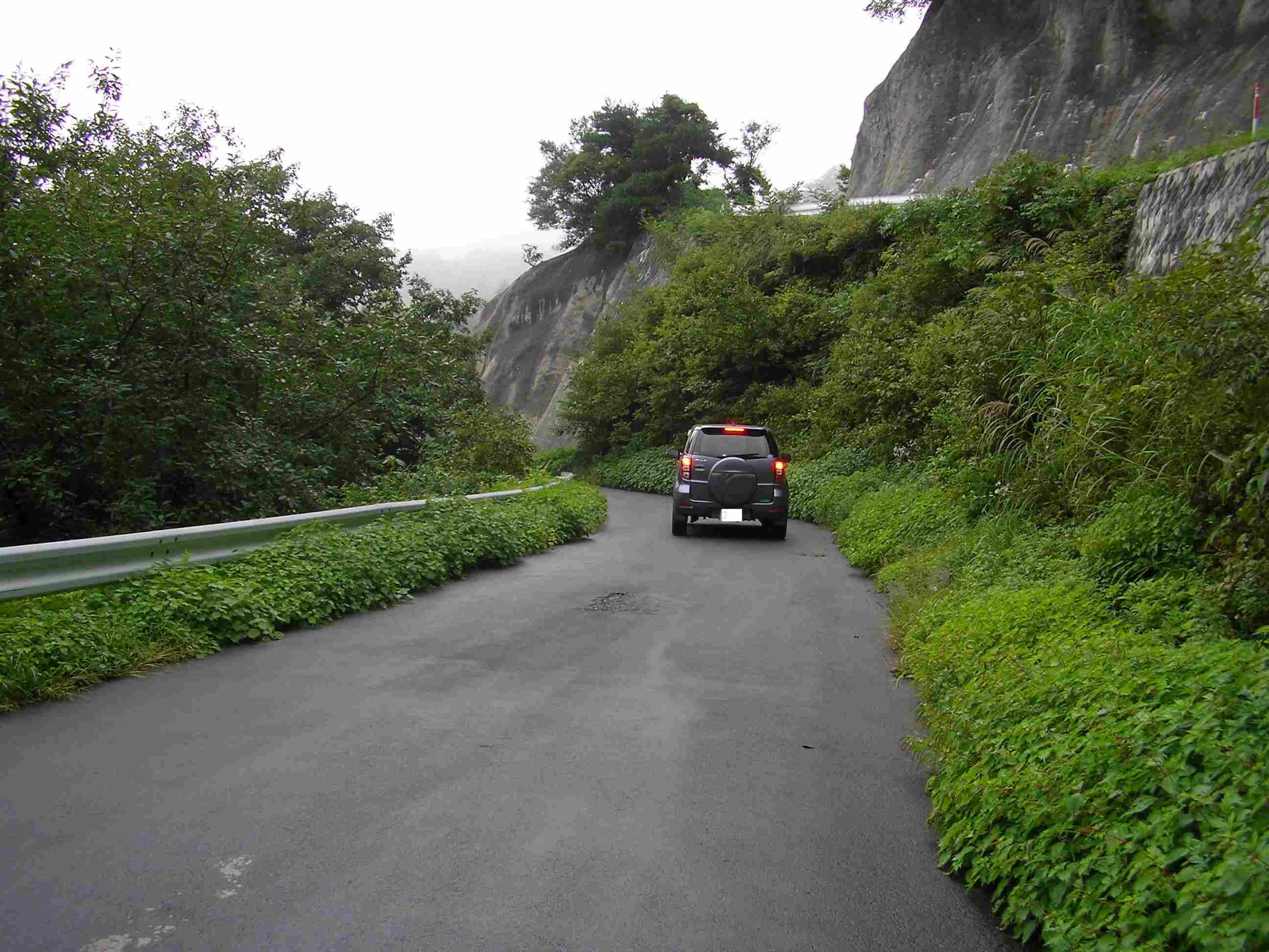 国道399号、山形県高畠町内で狭い道を下る自動車。県境となる標高840mの鳩峰峠に近い。山形県側は狭隘なつづら折れの連続で強引に高度を稼いでいる。2007年9月